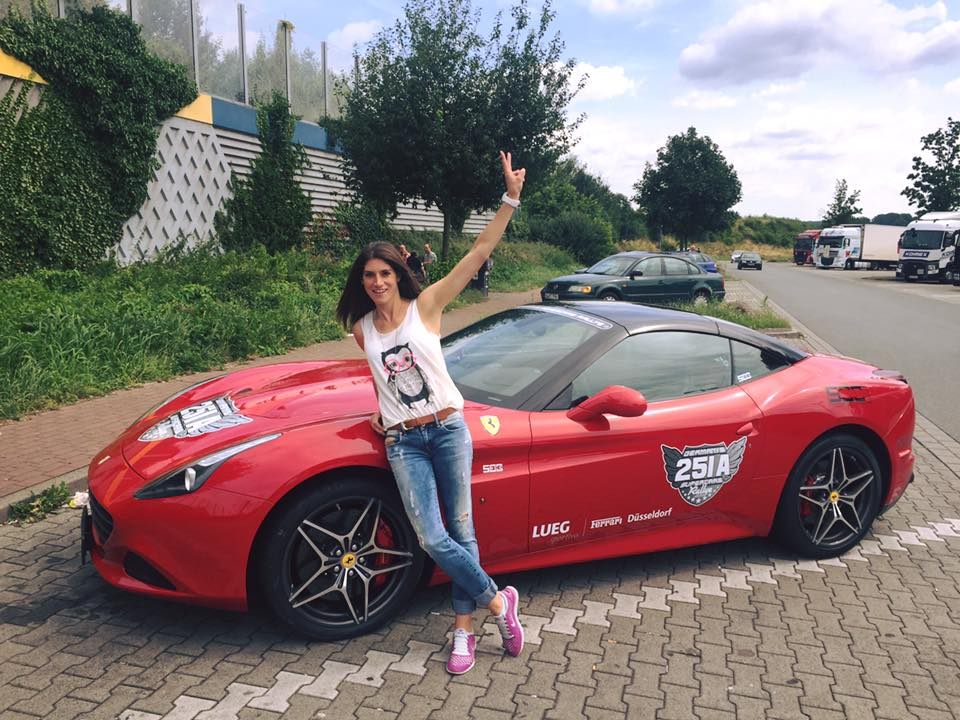 Profi-Rennfahrerin Cyndie Allemann bei GSR 2016, bei der sie einen Ferrari California T fuhr.